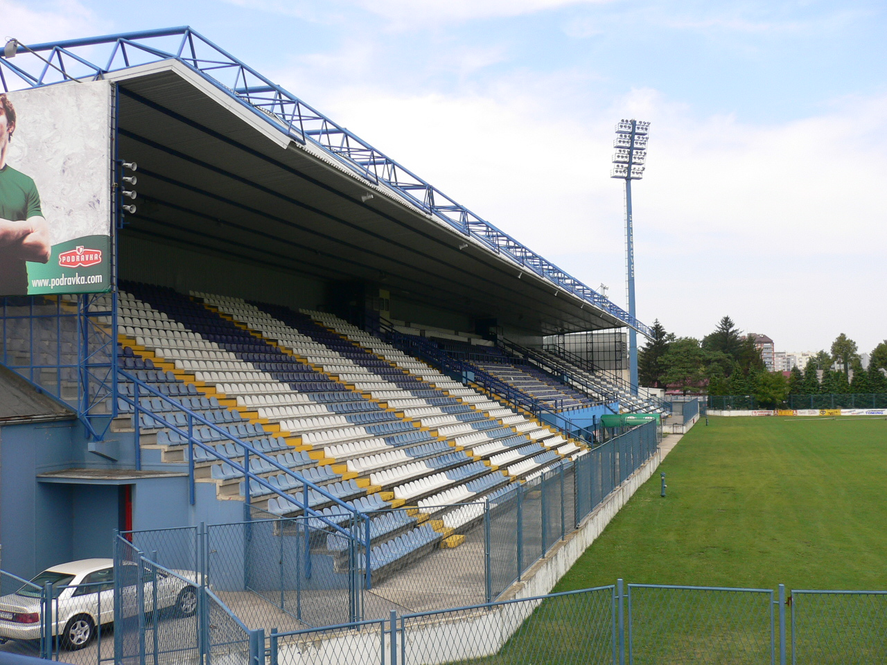 Stade varteks